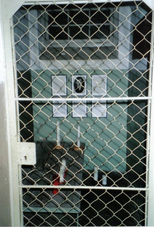 Zelle von Paul Schneider, hingerichtet in Buchenwald. (Anmerkung: die Zelle ist ihm wohl nur gewidmet.)